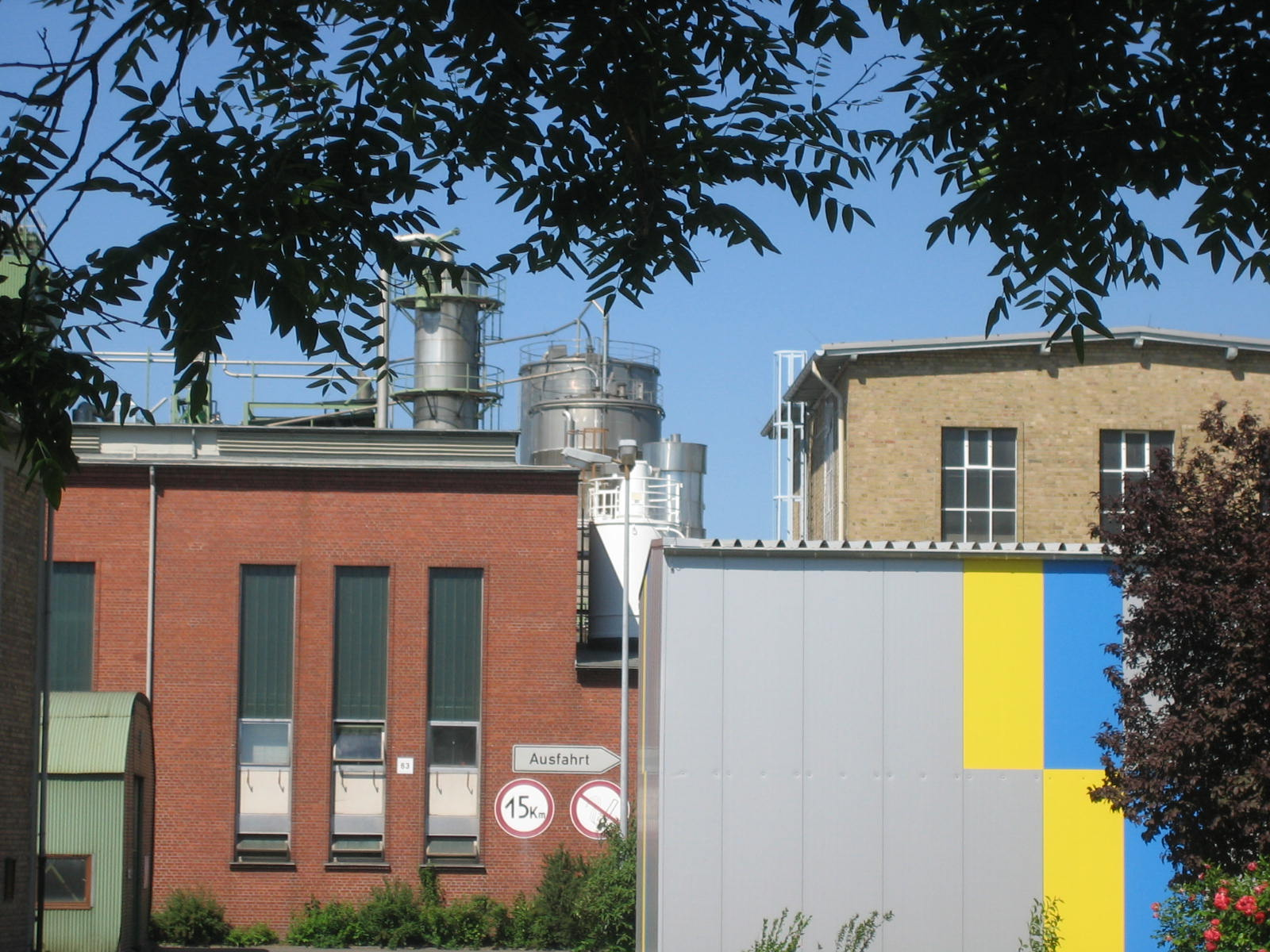 Ineos Paraform